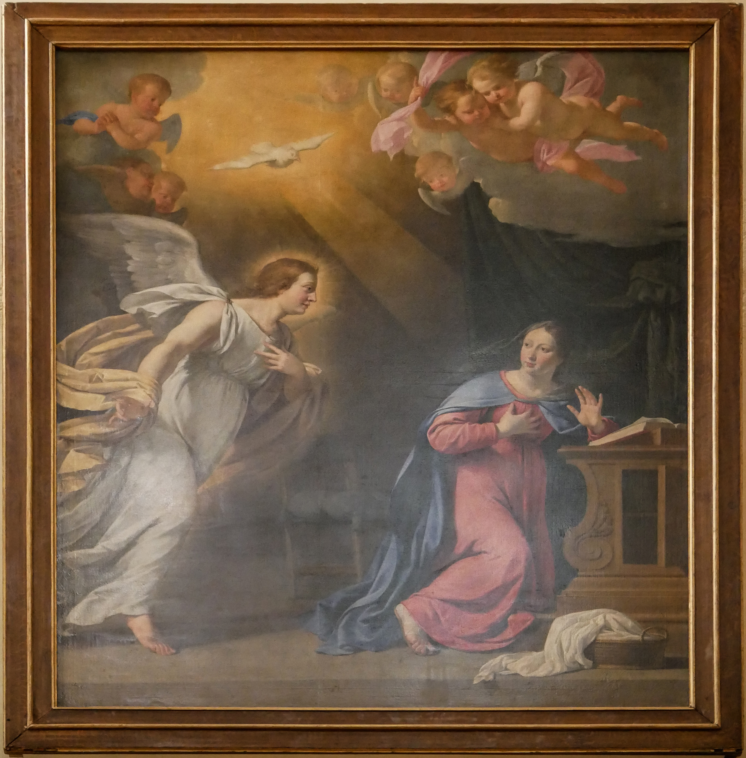 Tableau présent dans la basilique Notre-Dame-du-Port de Clermont-Ferrand.